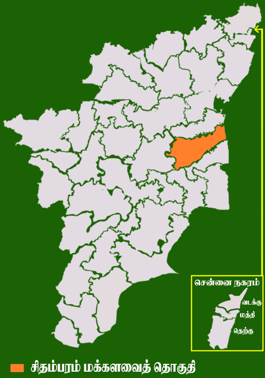 தமிழக வரைபடத்தில் உள்ள சிதம்பரம் மக்களவைத் தொகுதி